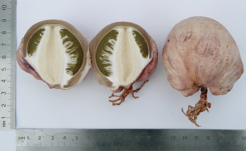 Веселка Адриана - стадия яйца